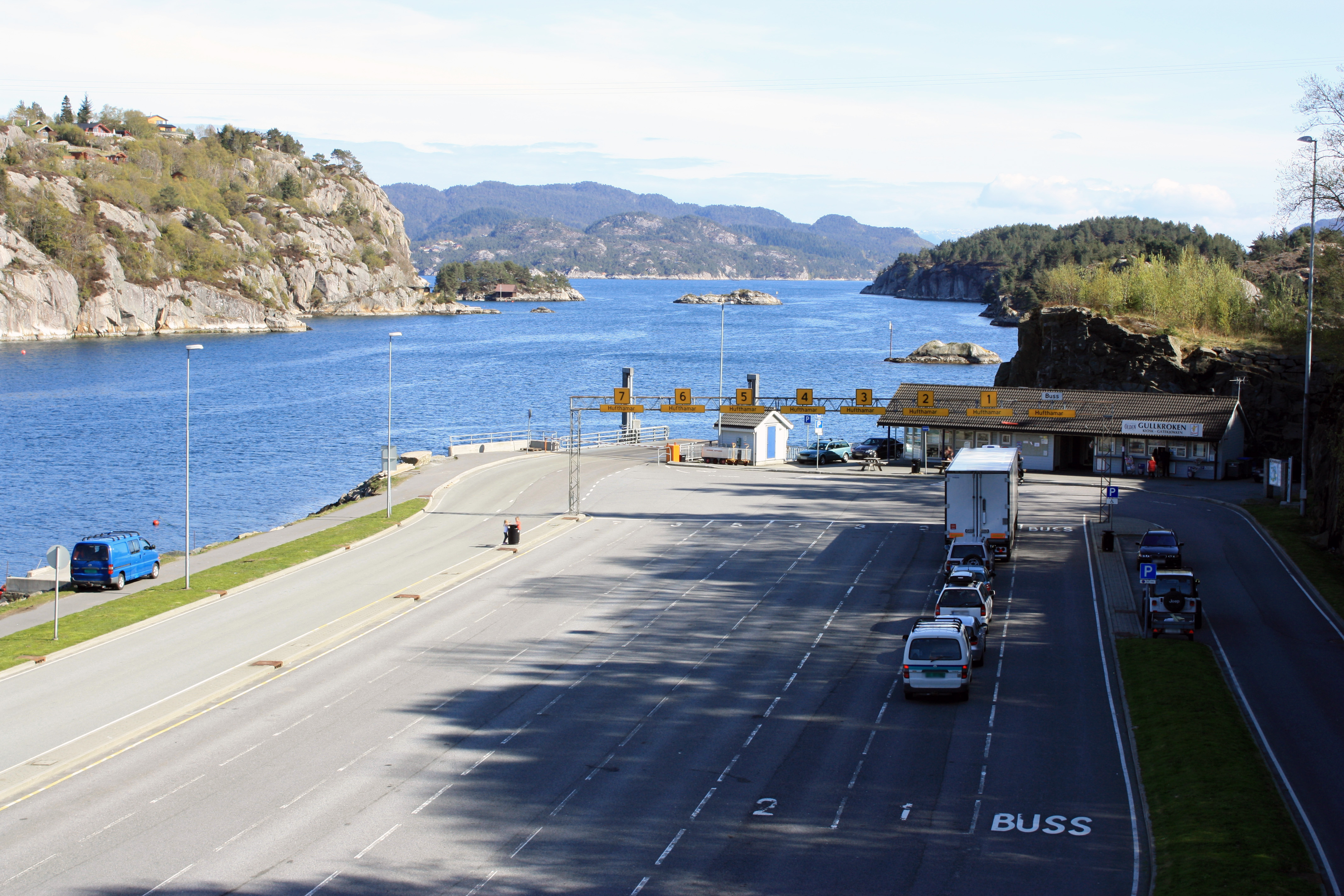 Krokeide kai, Fana, Bergen.